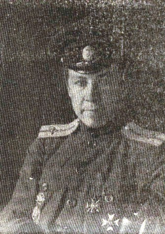 Баранов Вячеслав Григорьевич